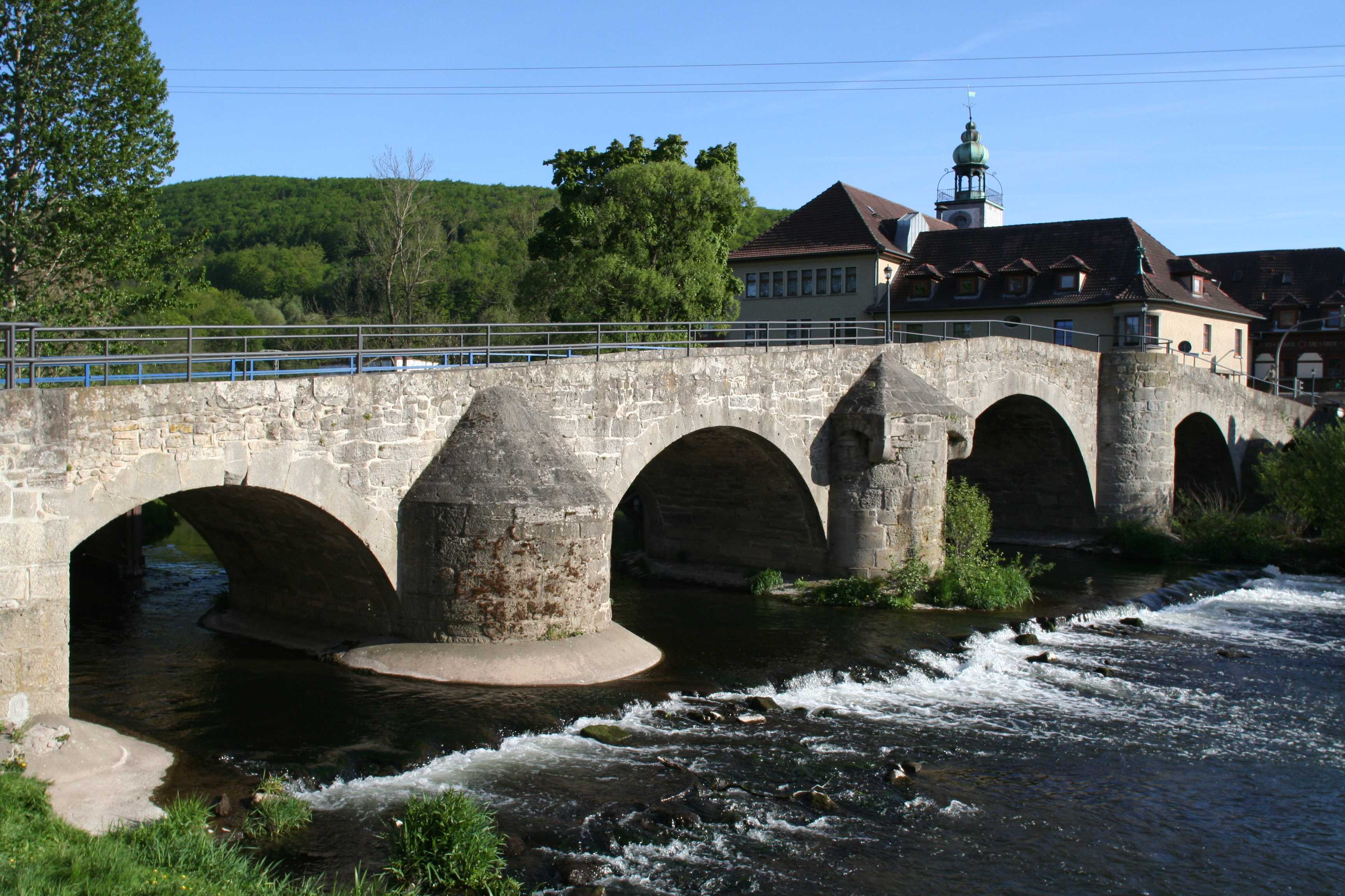 Werrabrücke in Obermaßfeld, Landkreis Schmalkalden-Meiningen